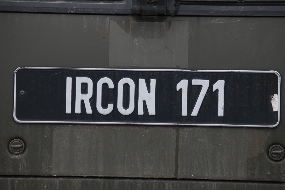 IRCON Reg Plate